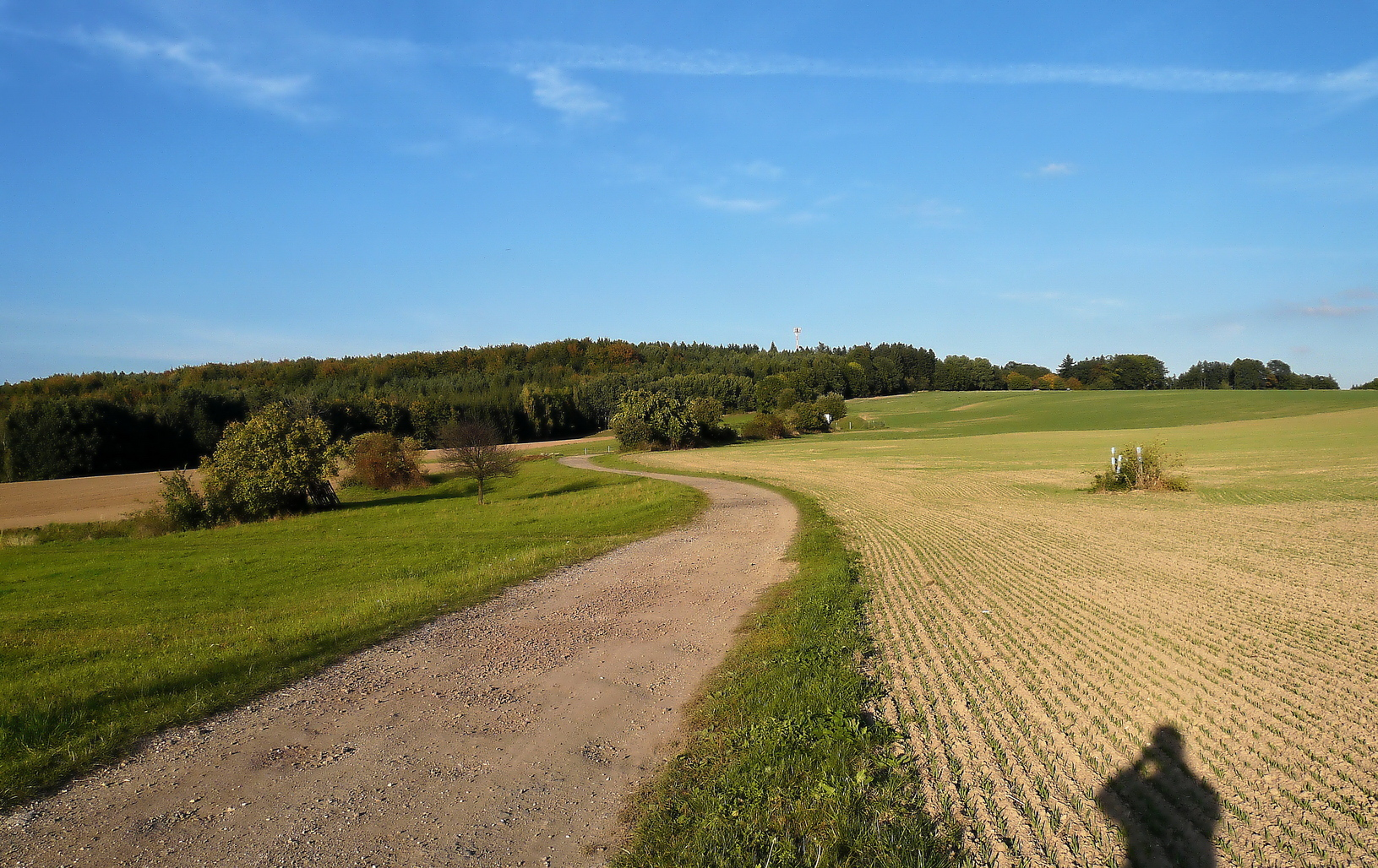 Cesta na Nepřívěckou hůru